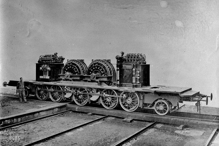 Fahrgestell BLS Elektrolokomotive Be 5/7